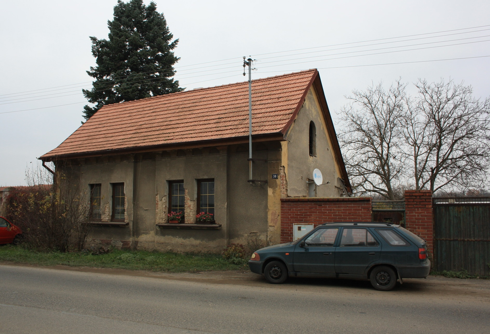 Dům číslo popisné 30 v Dušníkách, části Obříství.